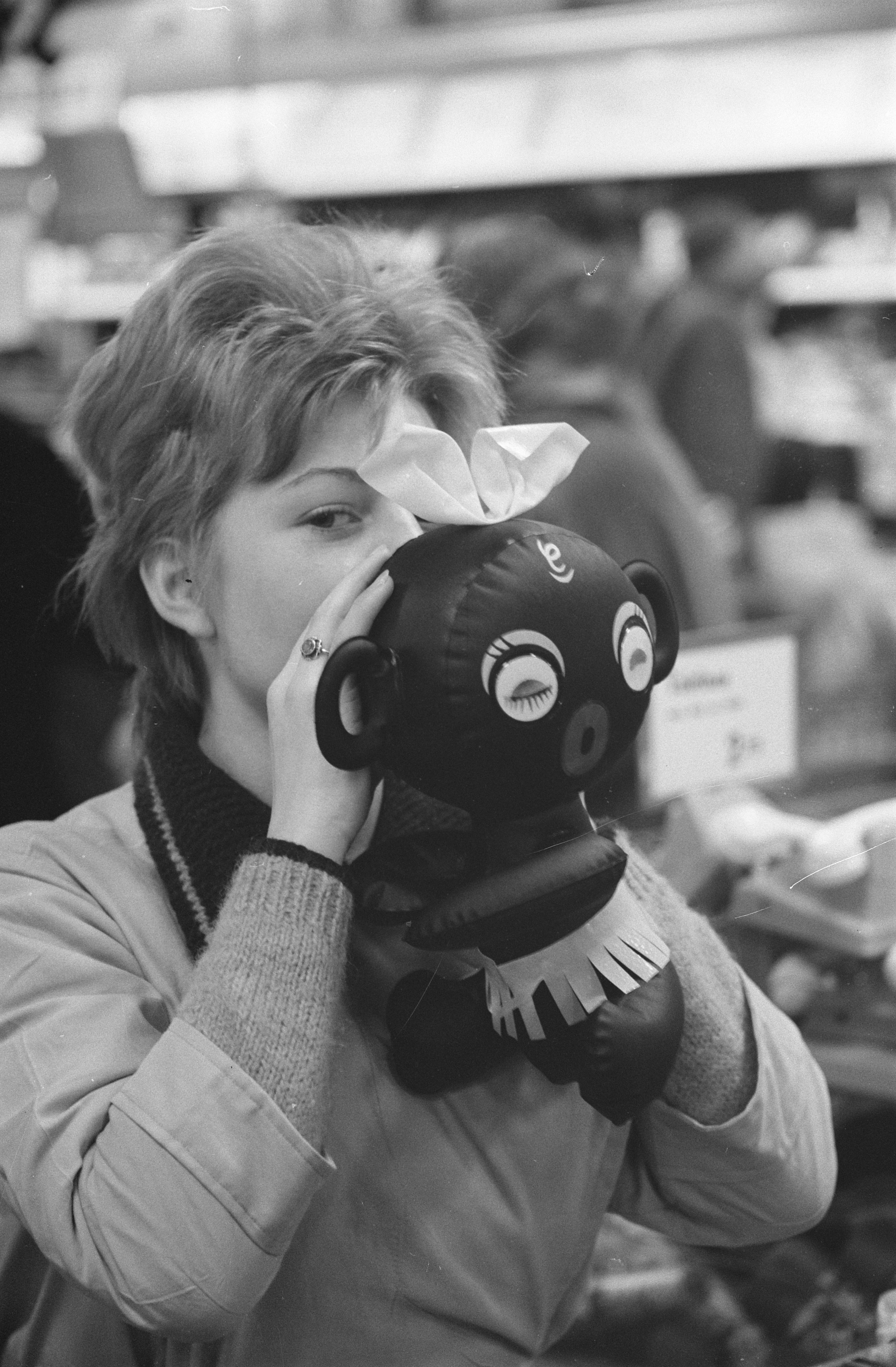 Collectie / Archief : Fotocollectie Anefo Reportage / Serie : [ onbekend ] Beschrijving : Drukte in de grote warenhuizen i.v.m. komende St. Nicolaas belangstelling voor "Winky dolls" Datum : 11 november 1960 Trefwoorden : WARENHUIZEN, belangstelling Persoonsnaam : Sinterklaas Fotograaf : Pot, Harry / Anefo Auteursrechthebbende : Nationaal Archief Materiaalsoort : Negatief (zwart/wit) Nummer archiefinventaris : bekijk toegang 2.24.01.05 Bestanddeelnummer : 911-7623